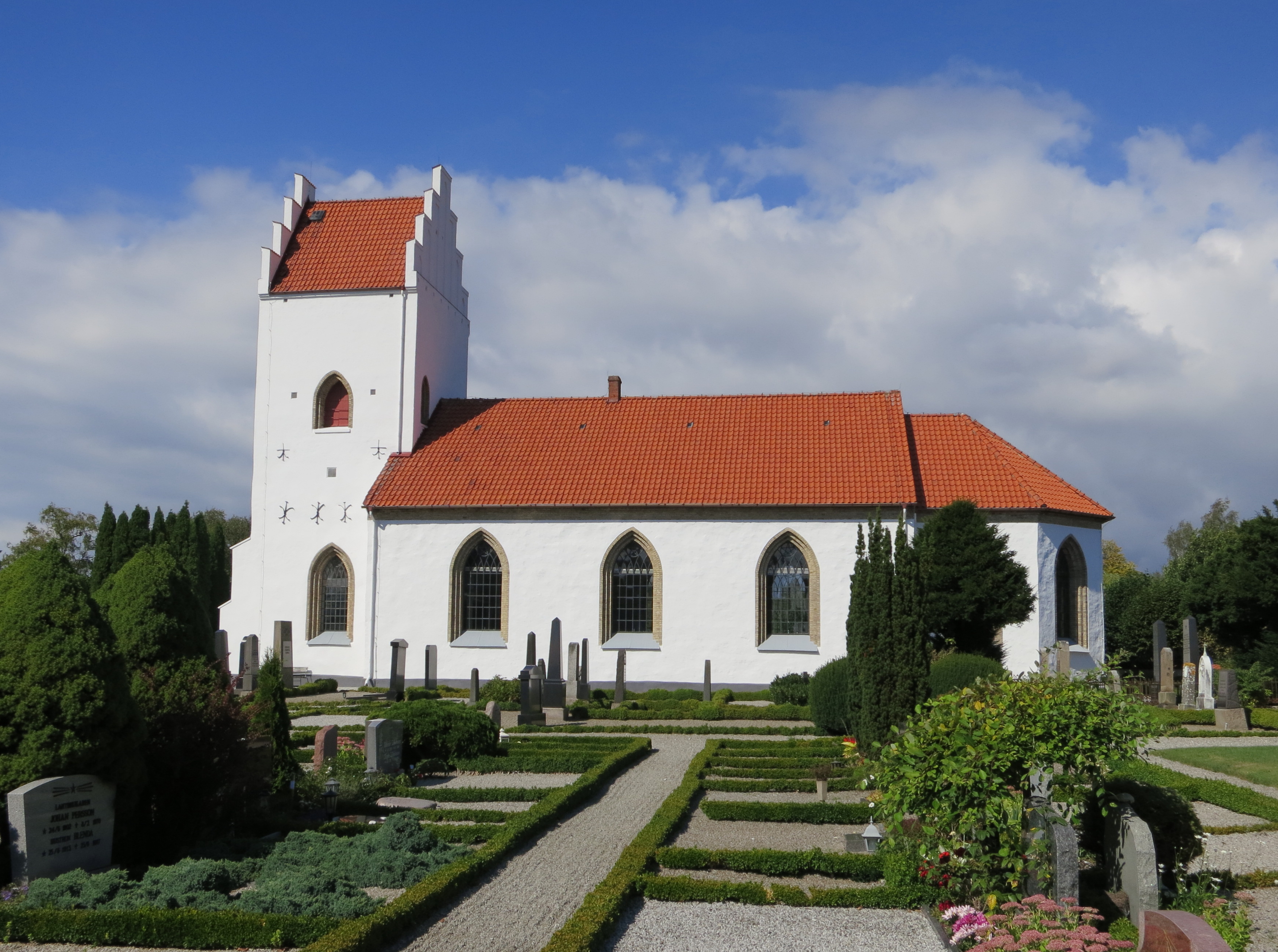 Eskilstorps kyrka i Vellinge, Skåne